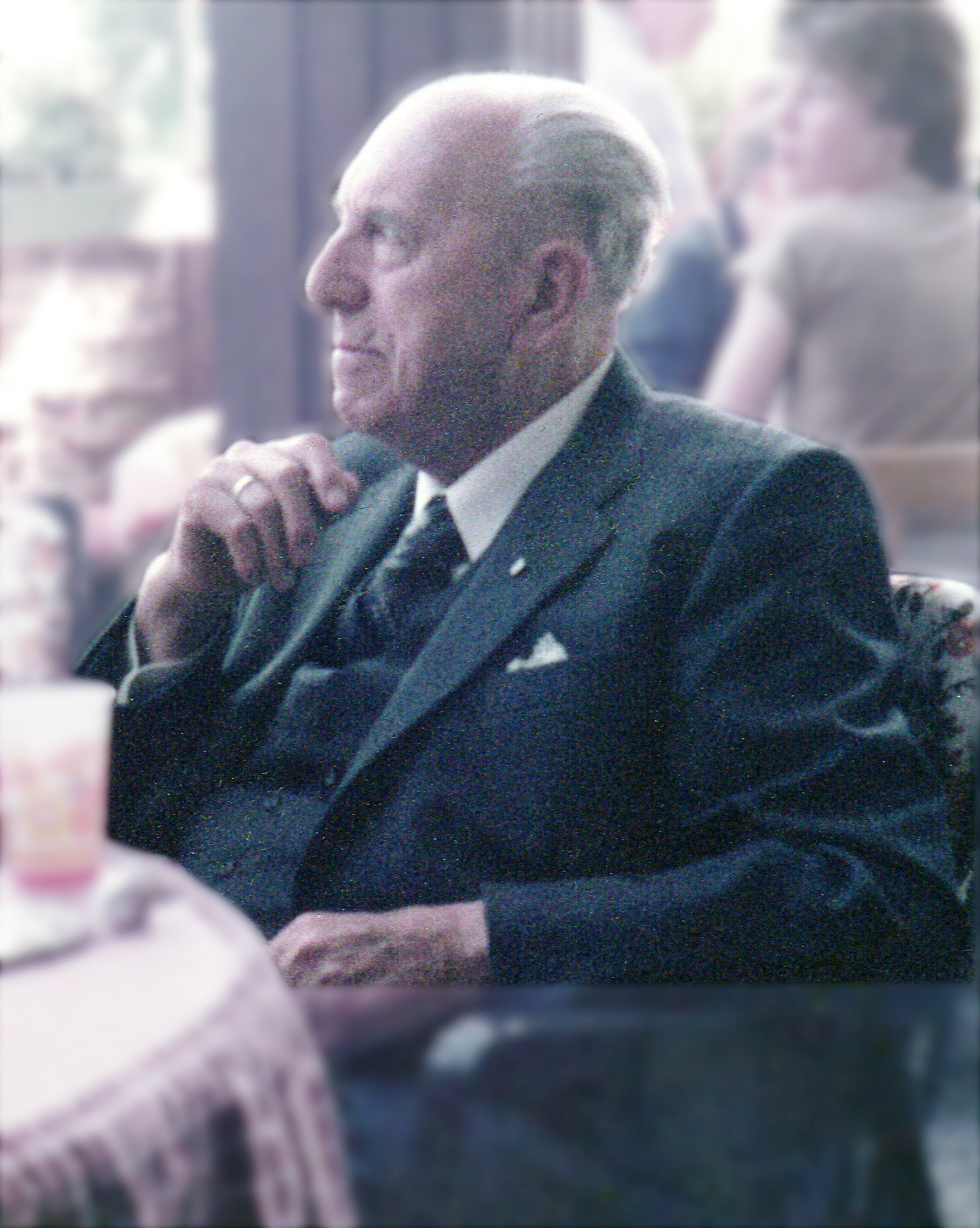 Albert Magnus, Amtsbürgermeister des Amtes Cochem-Land 1948-1965.